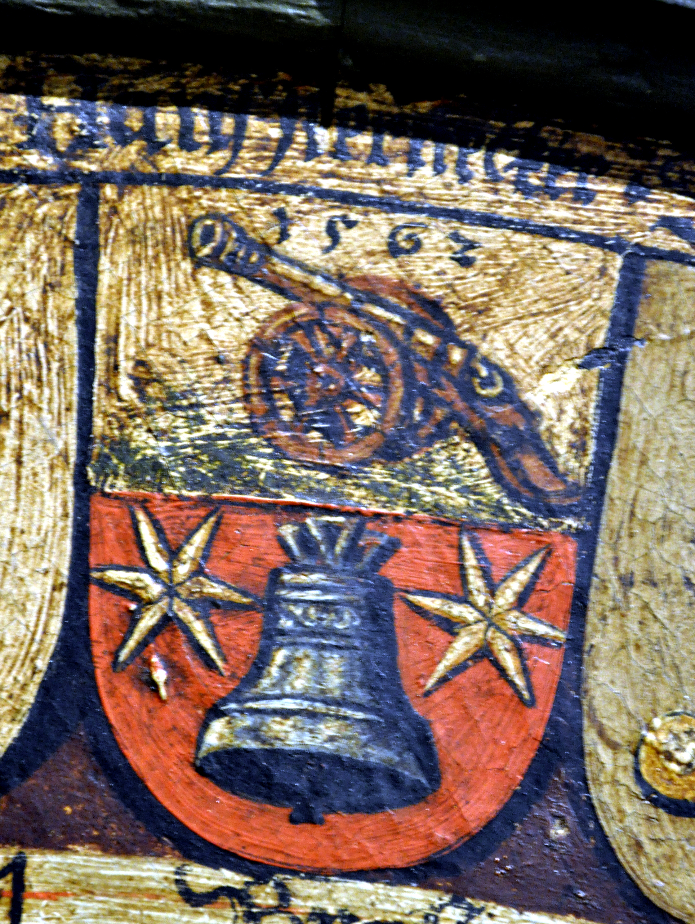 Museum Humpis-Quartier, Ravensburg Meistertafel der Schmiedezunft Ravensburg (ab 1505), Detail Hans Pernecker, 1562